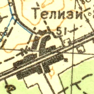 Топографическая карта Ленинградской области, квадрат О-35-12-Г (Ропша), деревня Телези